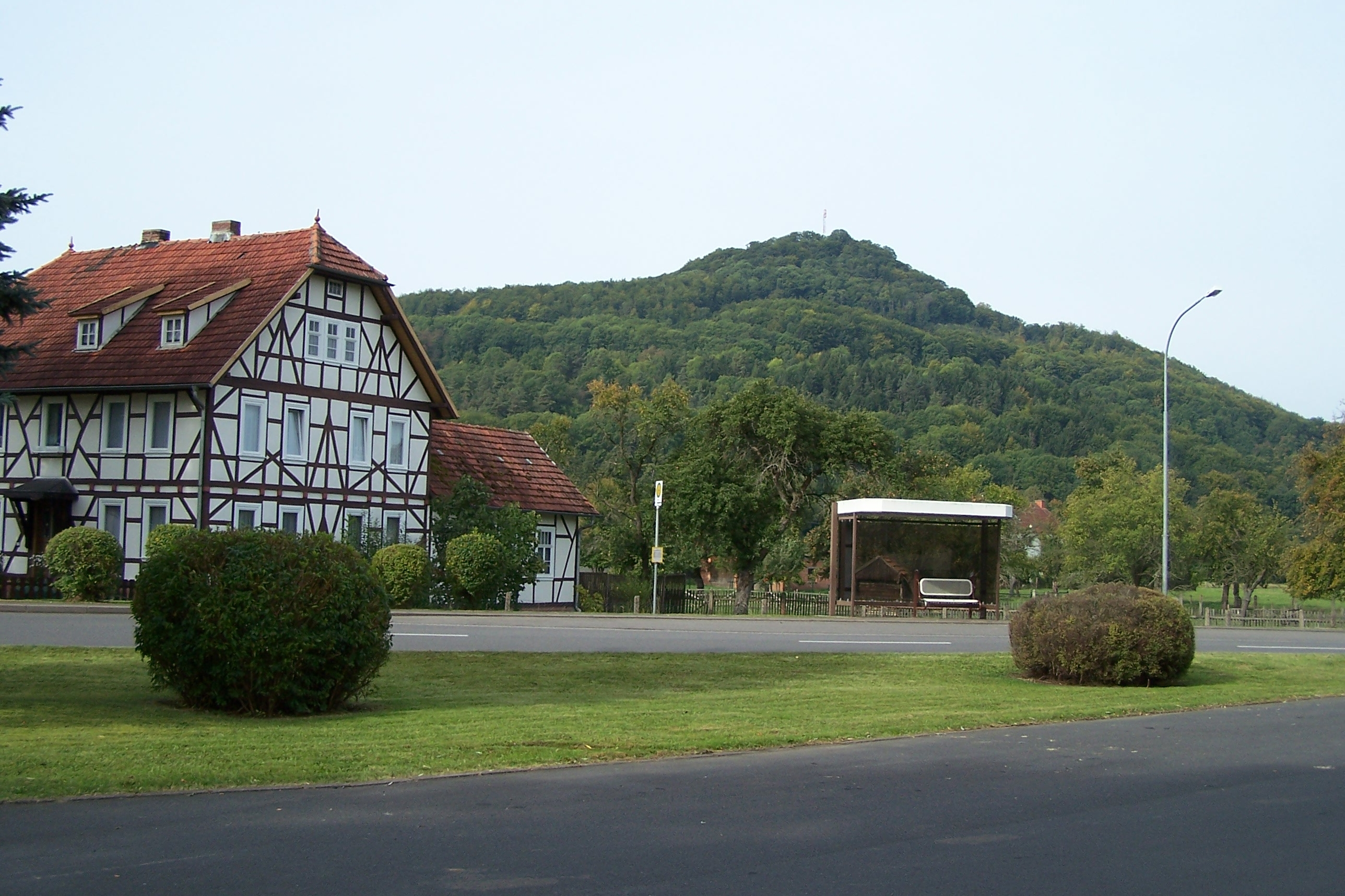 Motzlar